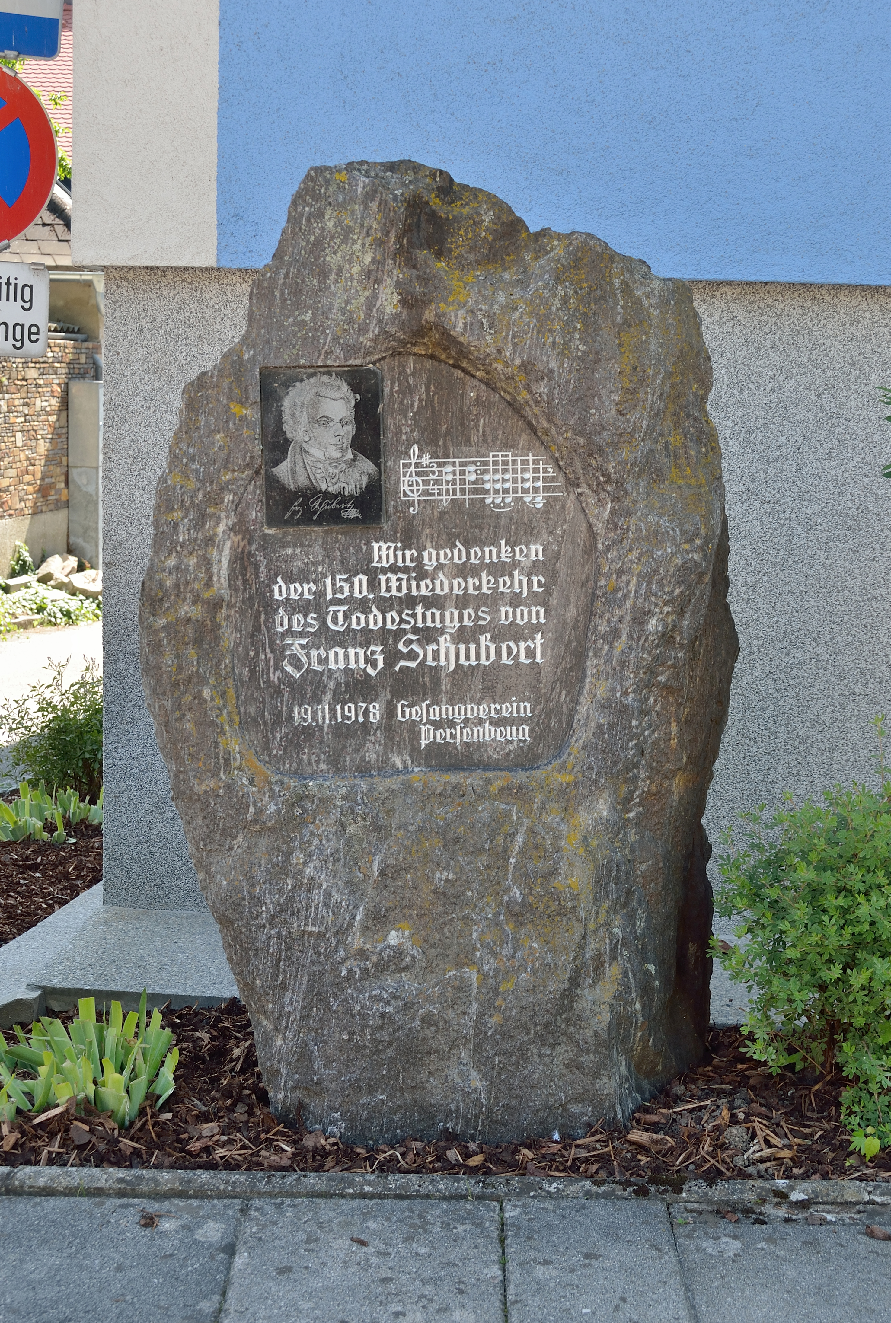 Gedenkstein anlässlich des 150. Todestags von Franz Schubert am vor dem Musikverein am Rathausplatz in Persenbeug.